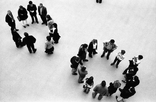 Pinakothek der Moderne. München, Mai 2003. Fotografie aus einer Serie für ein Leporello des Freundeskreises der Stiftung Pinakothek der Moderne, 2003 (Gestaltung: Rolf Müller)